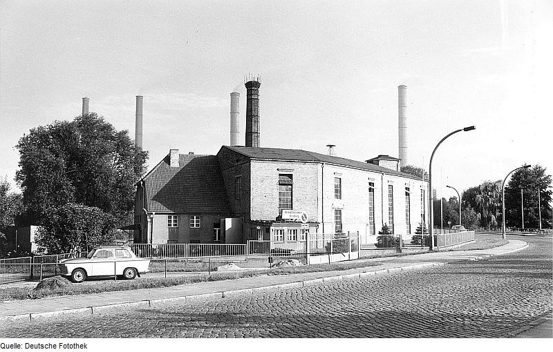 Original image description from the Deutsche Fotothek Boxberg/O.L.. Ehem. Holzstoff-Fabrik, jetzt Drahtseilwerk